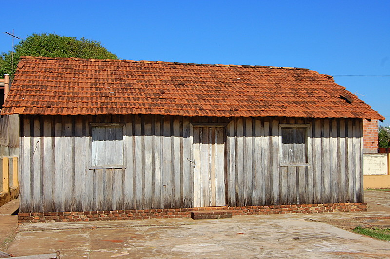 Casa de madeira em que Tonico e Tinoco passaram os primeiros anos de infância. Originalmente localizada no bairro Guarantã de onde foi removida e transportada para o centro da cidade de Pratânia para visitação pública.